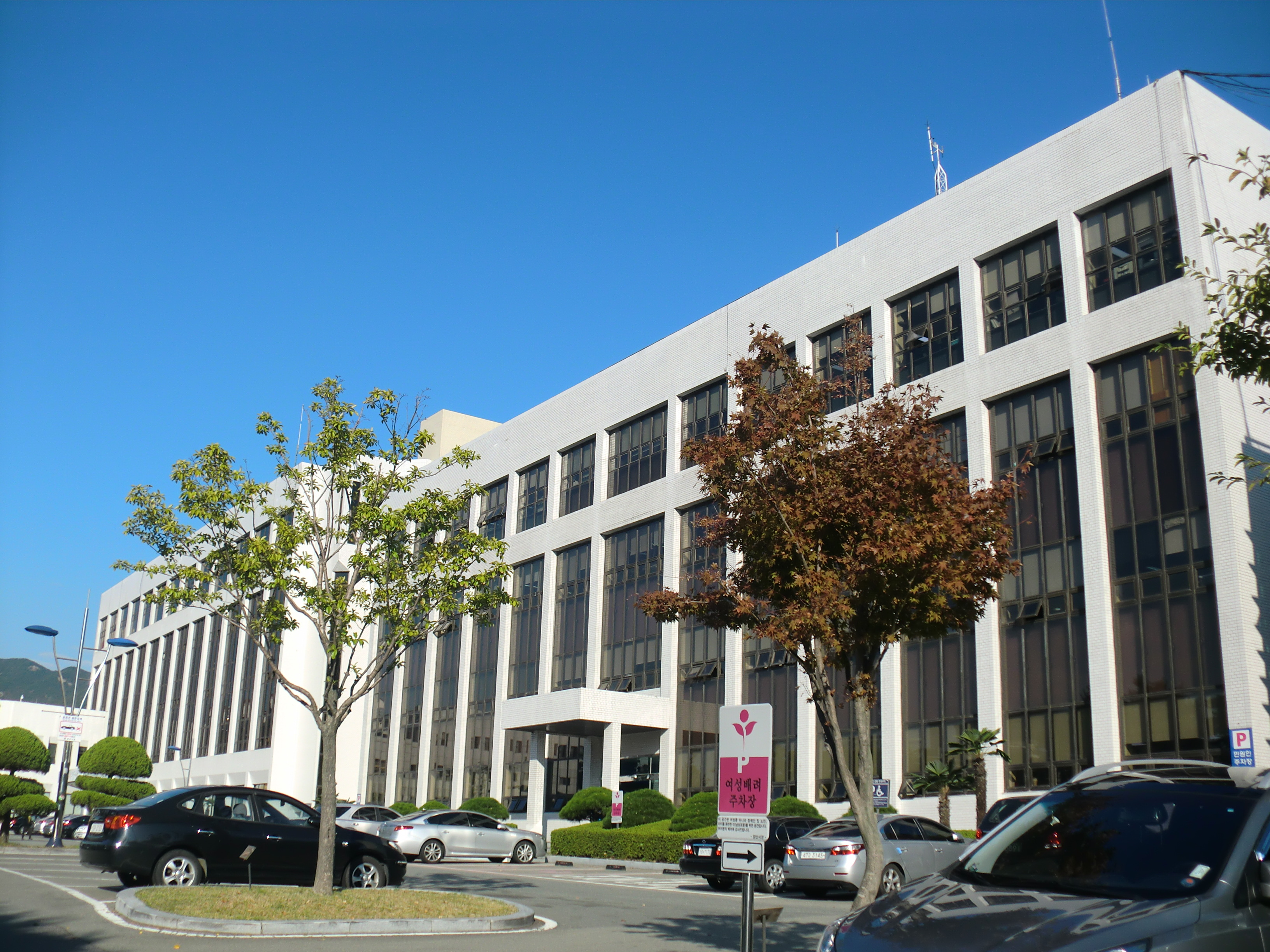 경상남도 양산시에 있는 양산시청